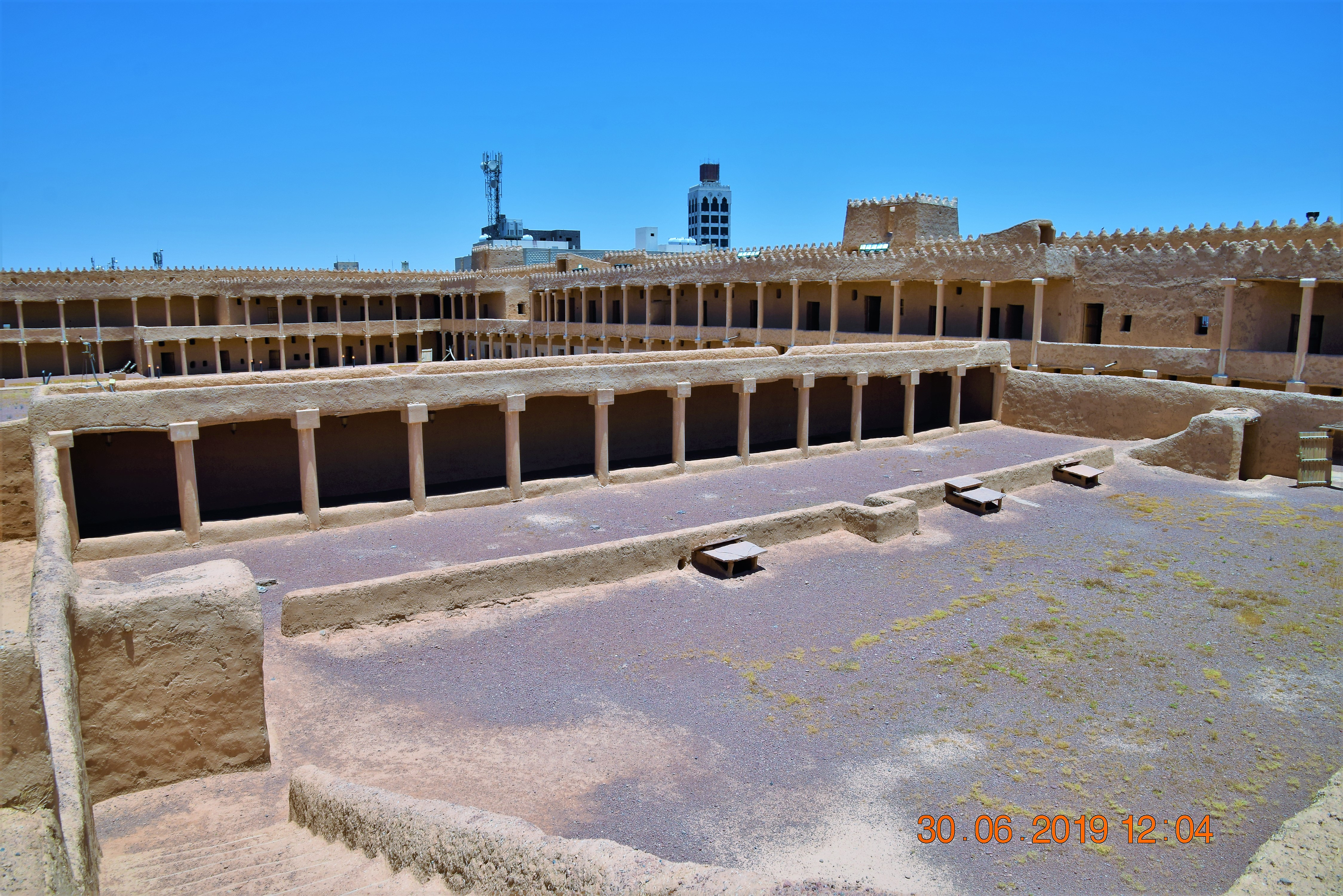 قصر القشلة هو قصر تاريخي بني في عهد الملك عبد العزيز بن عبد الرحمن آل سعود في سنة 1360 للهجر